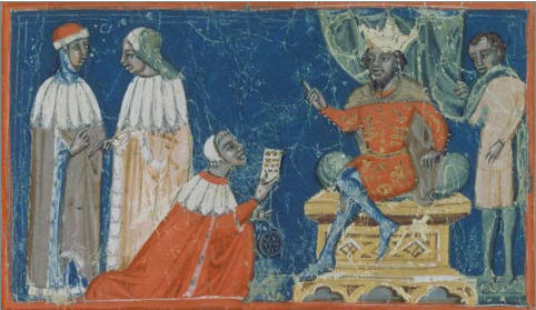 Fridrich Barbarossa